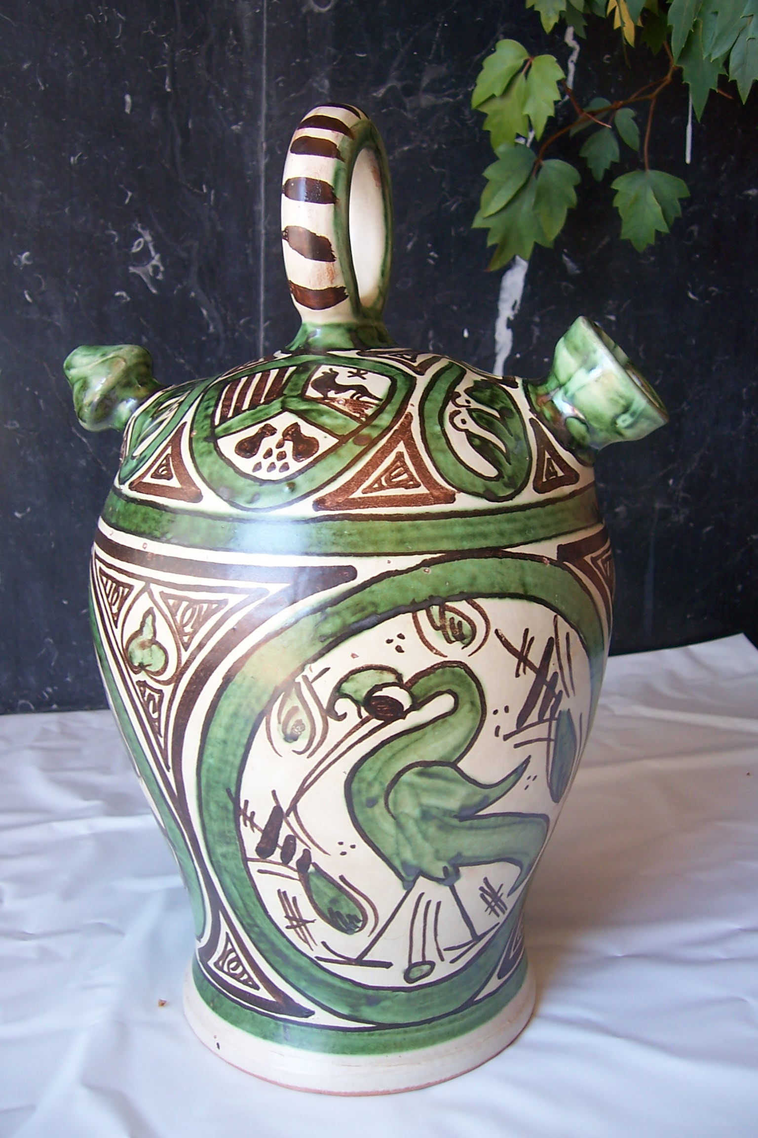 Cerámica de Teruel (España). Botijo vidriado.